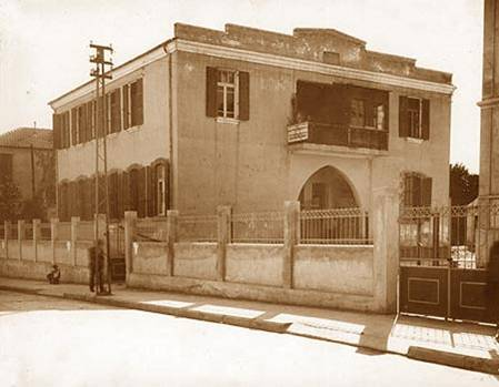 בניין בית היולדות ברחוב גרוזנברג